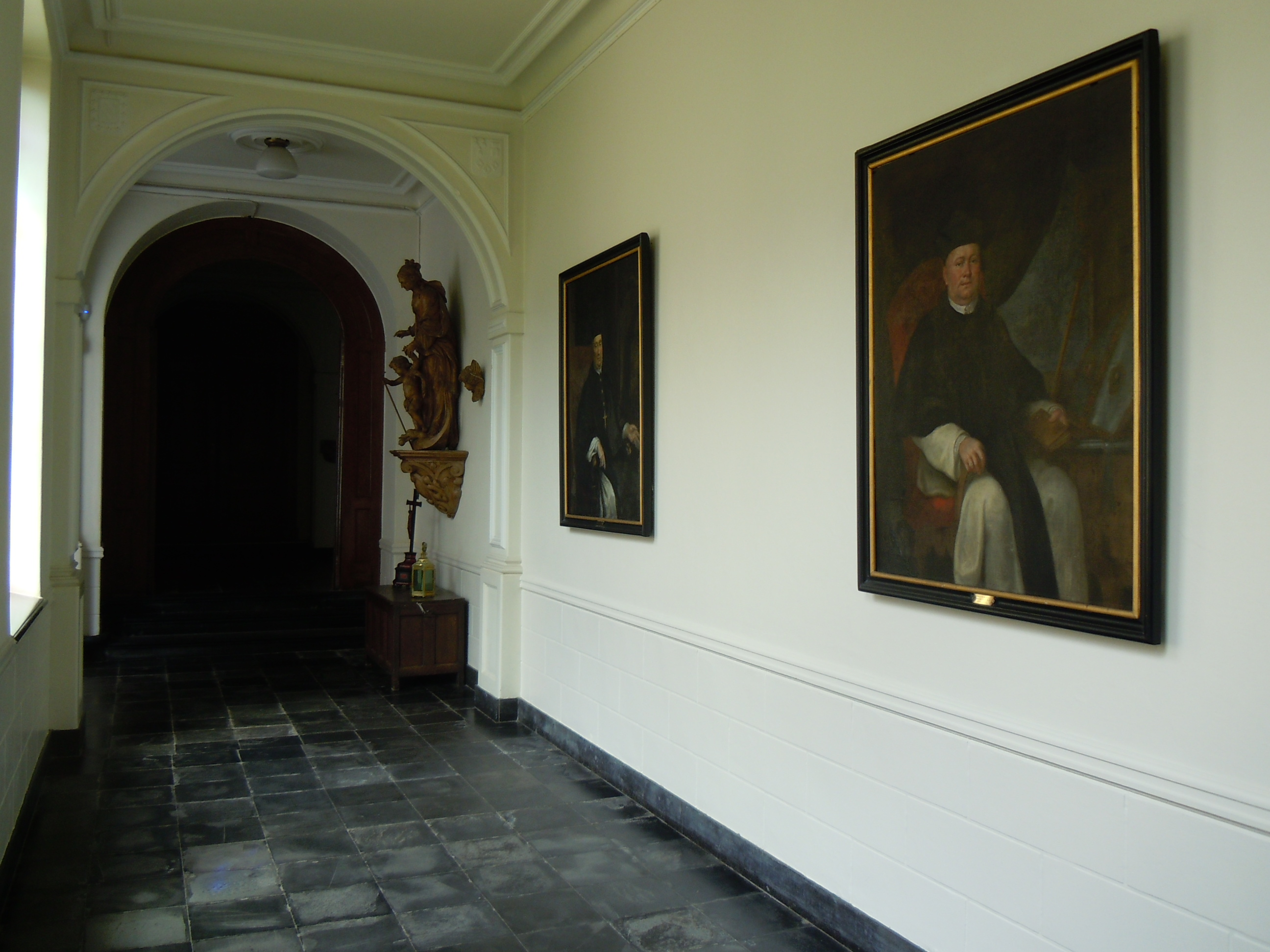 ABDIJ ST BERNARDVS